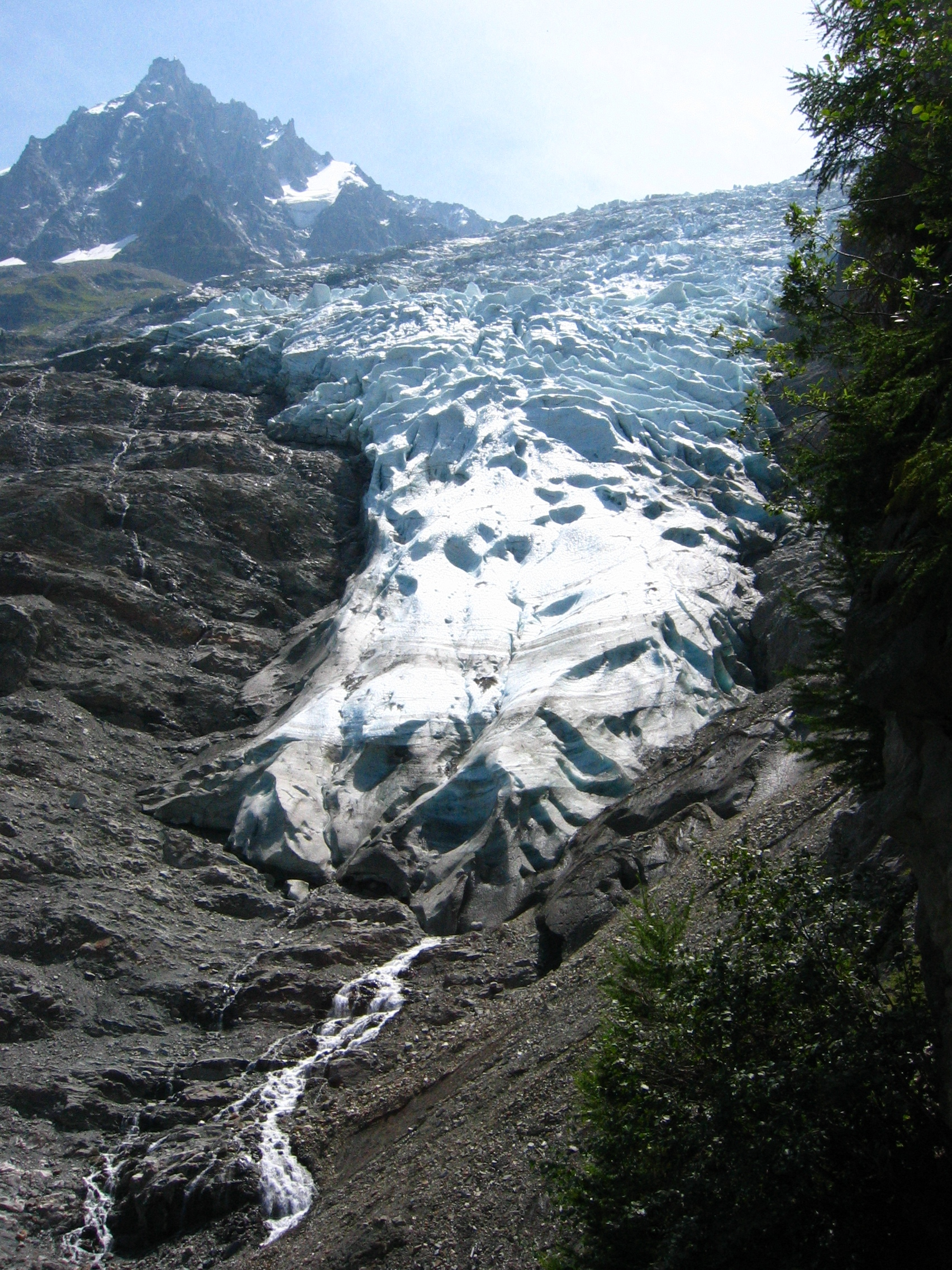 Glacier des Bossons, Chamonix, France